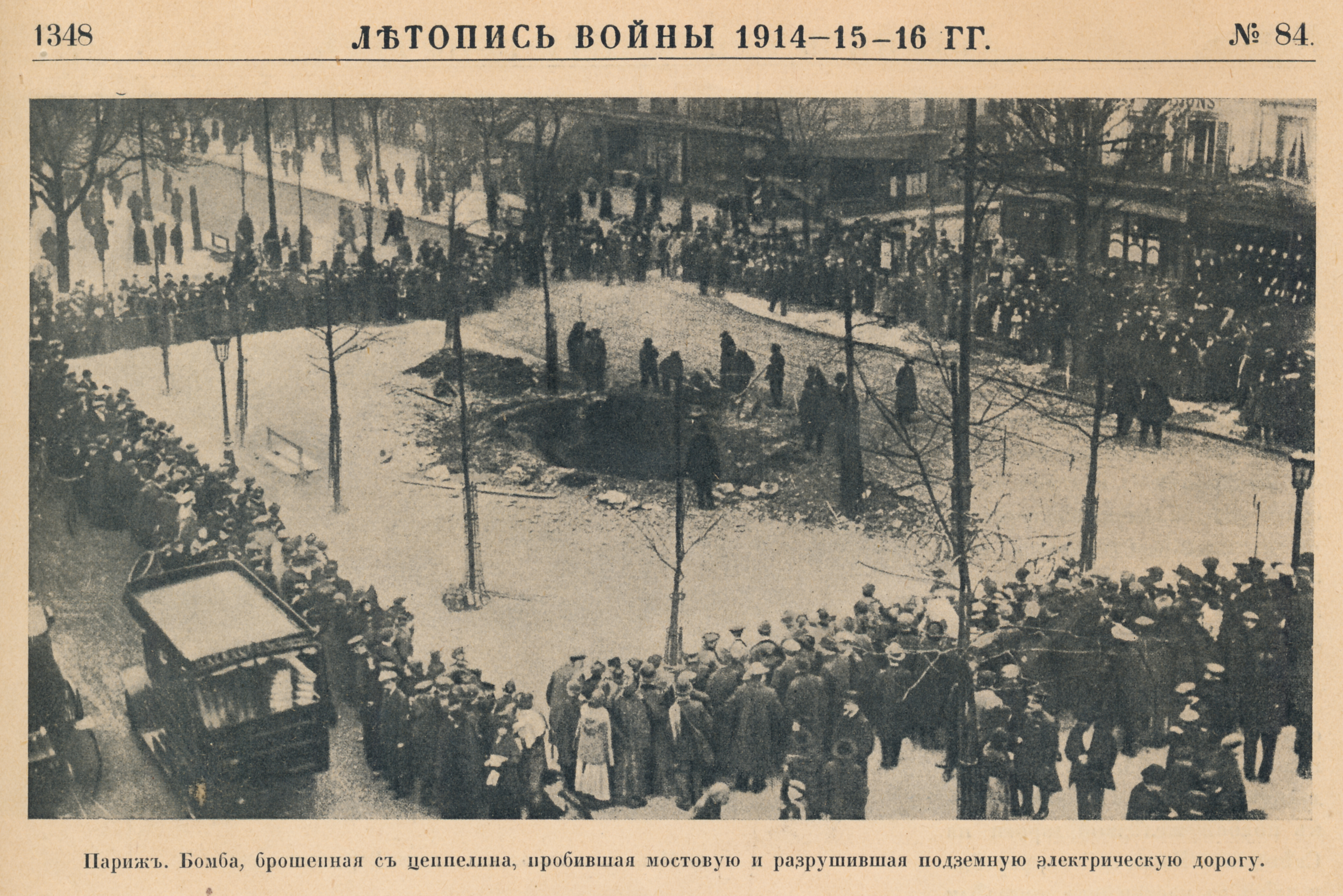 Raid aérien sur Paris le samedi 29 janvier 1916. Des deux dirigeables LZ77 (LZ 47) et LZ 79 (LZ 49) parties dans la soirée le premier survole Charleroi et Maubeuge avant de faire demi-tour en raison de problèmes mécaniques, tandis que le second poursuit sa mission et largue 17 ou 18 bombes sur Paris. Bilan: 26 morts et 32 blessés dans les quartiers de Belleville et Ménilmontant qui auront des funérailles nationales. La première bombe éclata sur le terre-plein d'un boulevard extérieur et creva la voûte du métro[1]. Photographie reproduite dans le magazine "Летопись войны" (Chronique de la guerre) No 84, 1916, p. 1348.